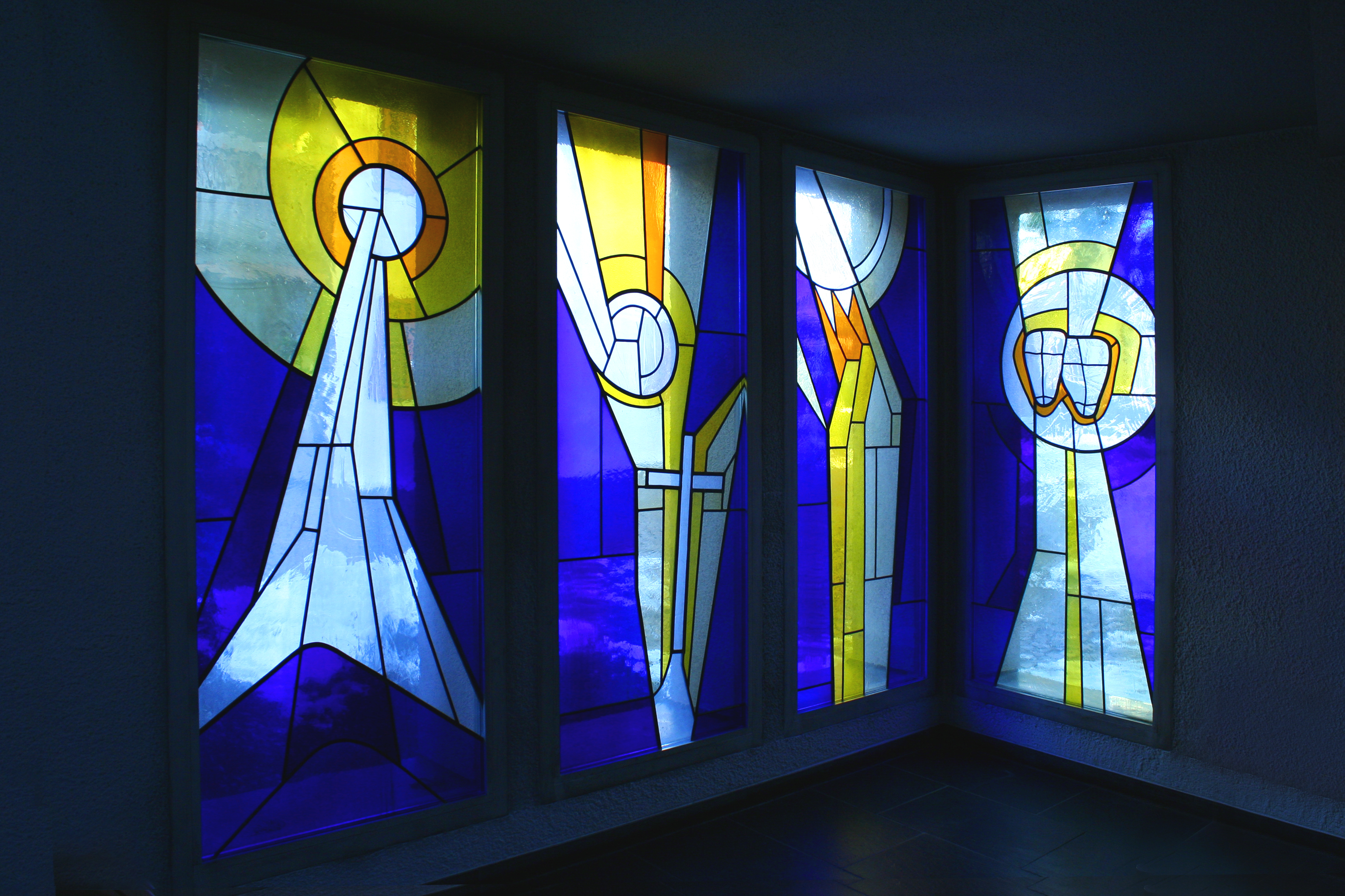 Römisch-katholische Kirche Bruder Klaus Zumikon,Glasfenster von Jean Bünter